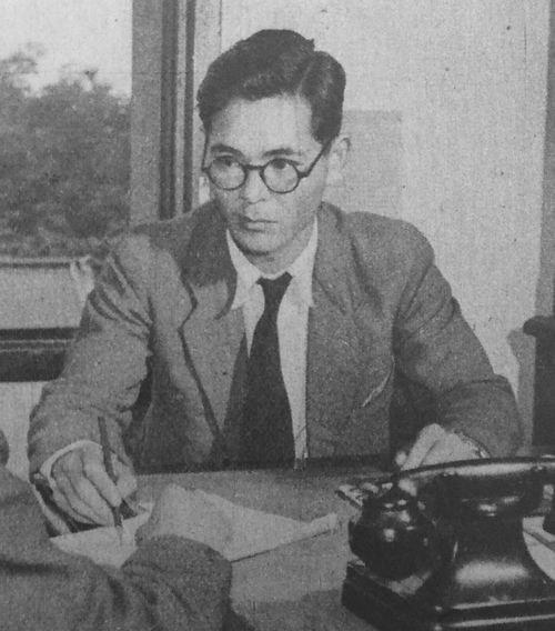 北村久寿男